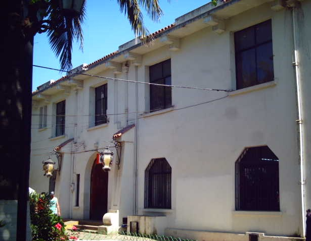 Edificio de los servicios públicos de Constitución (Chile), antigua Gobernación Departamental.